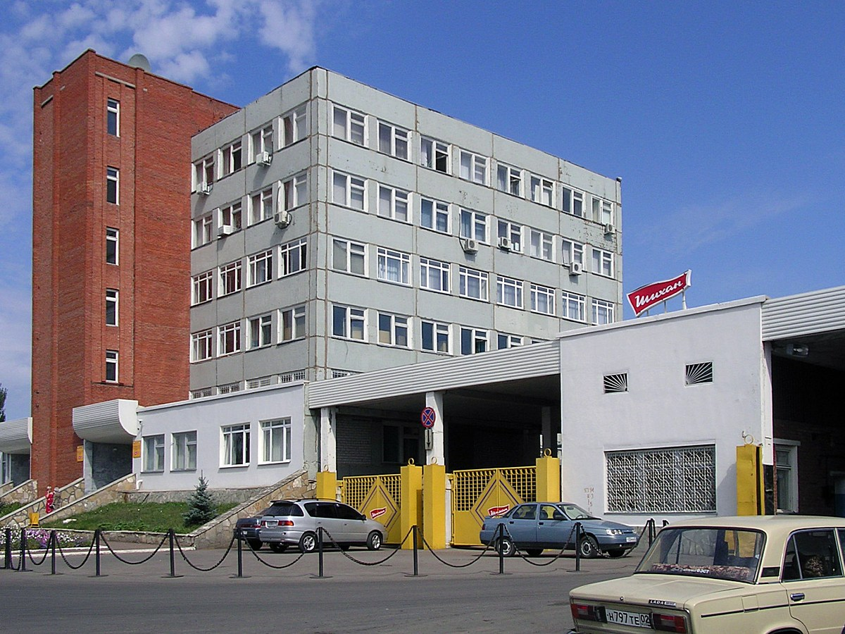 Пивзавод «Шихан» в Стерлитамаке